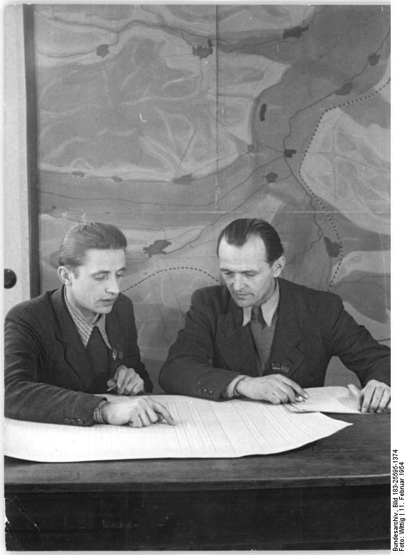 Weissensee, Planung der Ernte Zentralbild Wittig (TBD) We-Wi. 11.2.1954 Die Vorbereitungen der MTS Weissensee zur Fühjahrsbestellung Die Kollegen aller Maschinen- und Traktorenstationen unserer Republik schaffen jetzt die Voraussetzungen für die erfolgreiche Durchführung der Frühahrsbestellung im Jahr der grossen Initiative. UBz: Der Leiter der MTS Weißensee, Bezirk Erfurt, Kollege Schwager (rechts) und der Oberagronom Lück beraten gemeinsam den termingebundenen Einsatzplan der MTS für die Frühjahrsbestellung. Diese gründliche Vorbereitung wird eine schnelle, ordnungsgemäße Einsatzbereitschaft jeder einzelnen Brigade und der Maschinen gewährleisten.